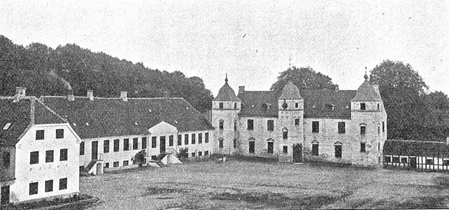 Hollufgaard er en gammel hovedgård, som nævnes første gang i 1487. Gården ligger i Fraugde Sogn, Åsum Herred, Odense Kommune. Hovedbygningen er opføret i 1577 og ombygget i 1829 og parken er på 8 hektar.